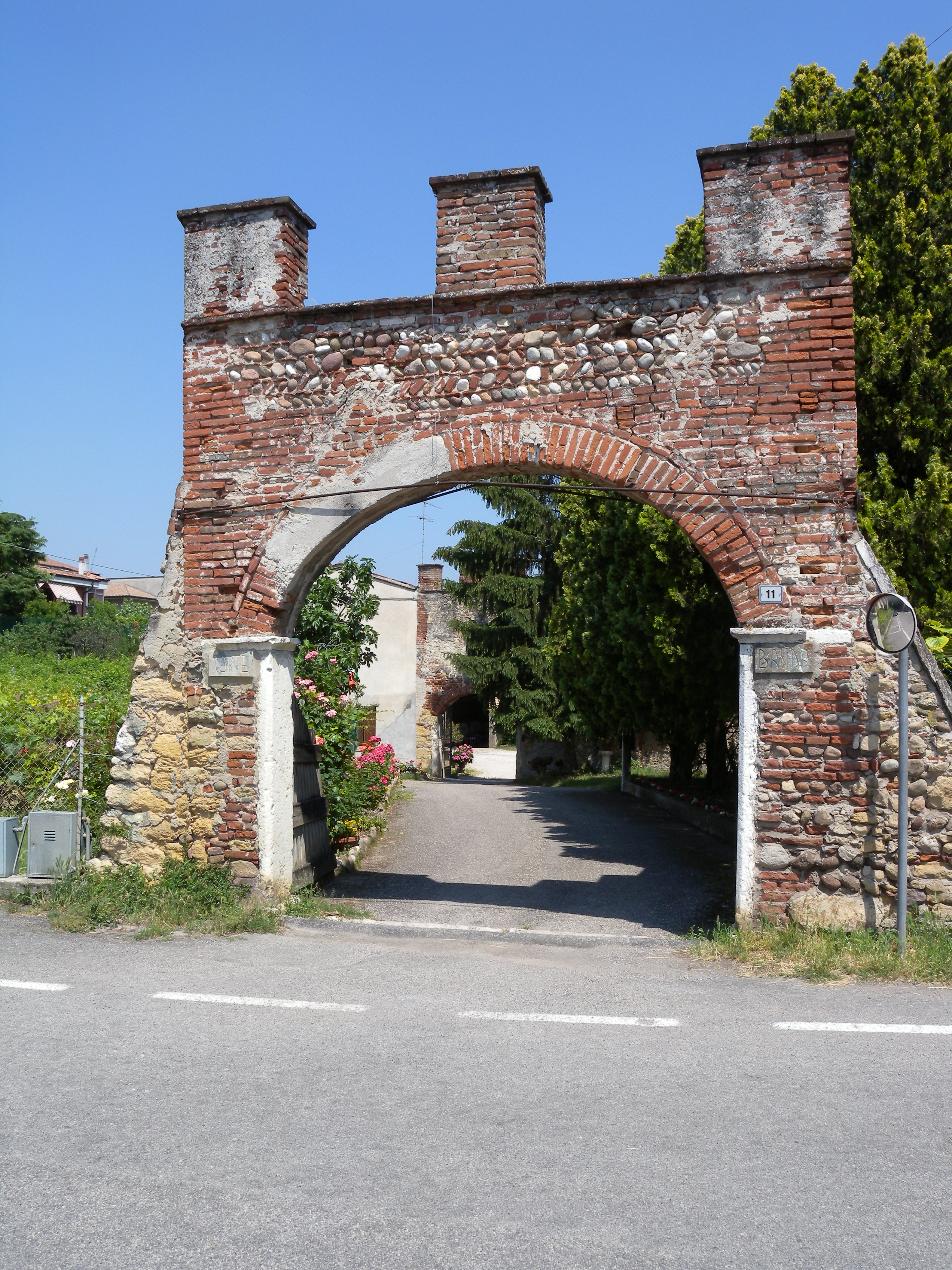 Ingresso di Villa Banca a Corrubbio, frazione di San Pietro in Cariano in provincia di Verona